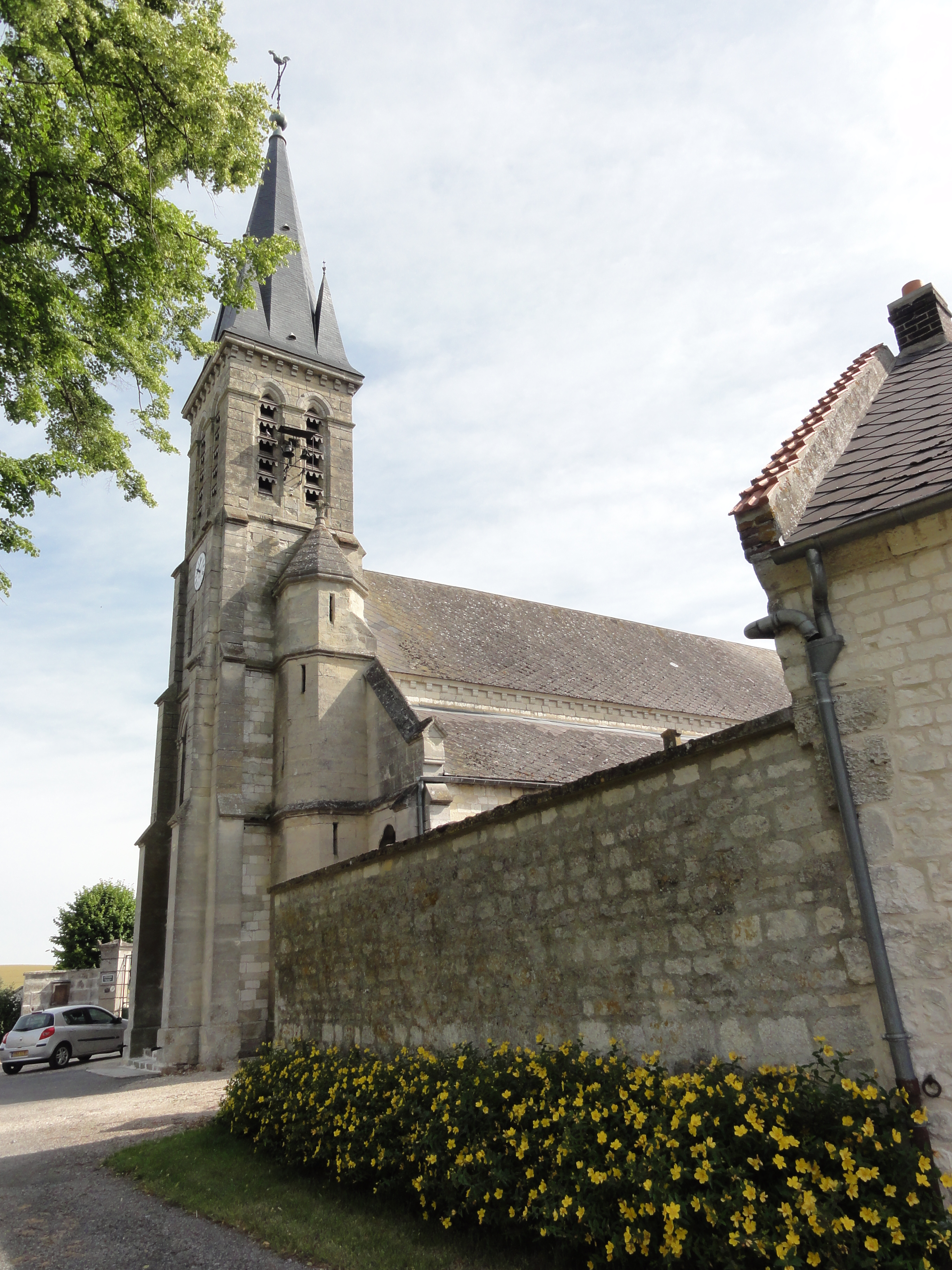 Lappion (Aisne) église